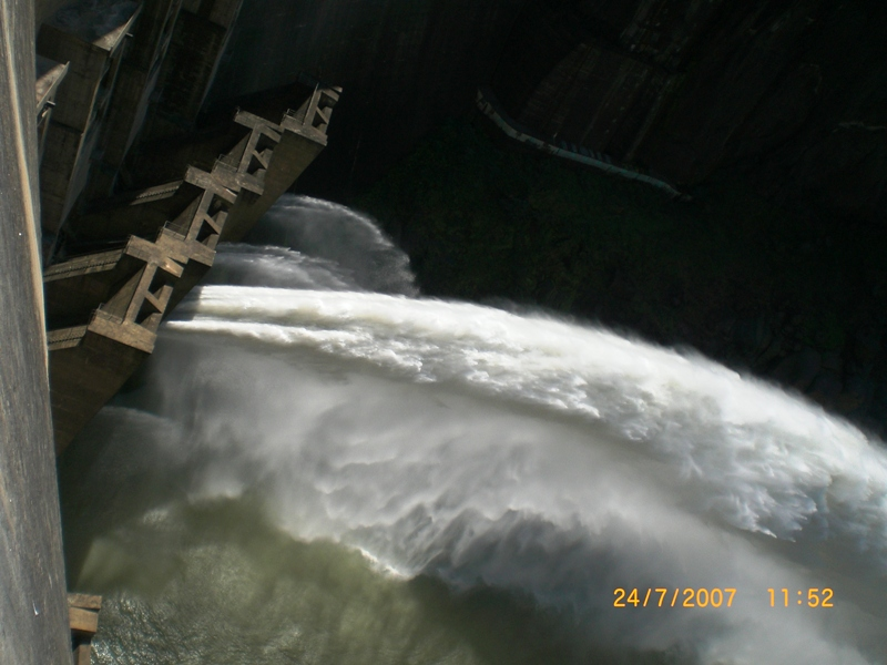 Cahora Bassa em Tete